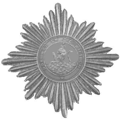 Ster uit 1807 van de Orde van Verdiensten de later Orde van de Unie.